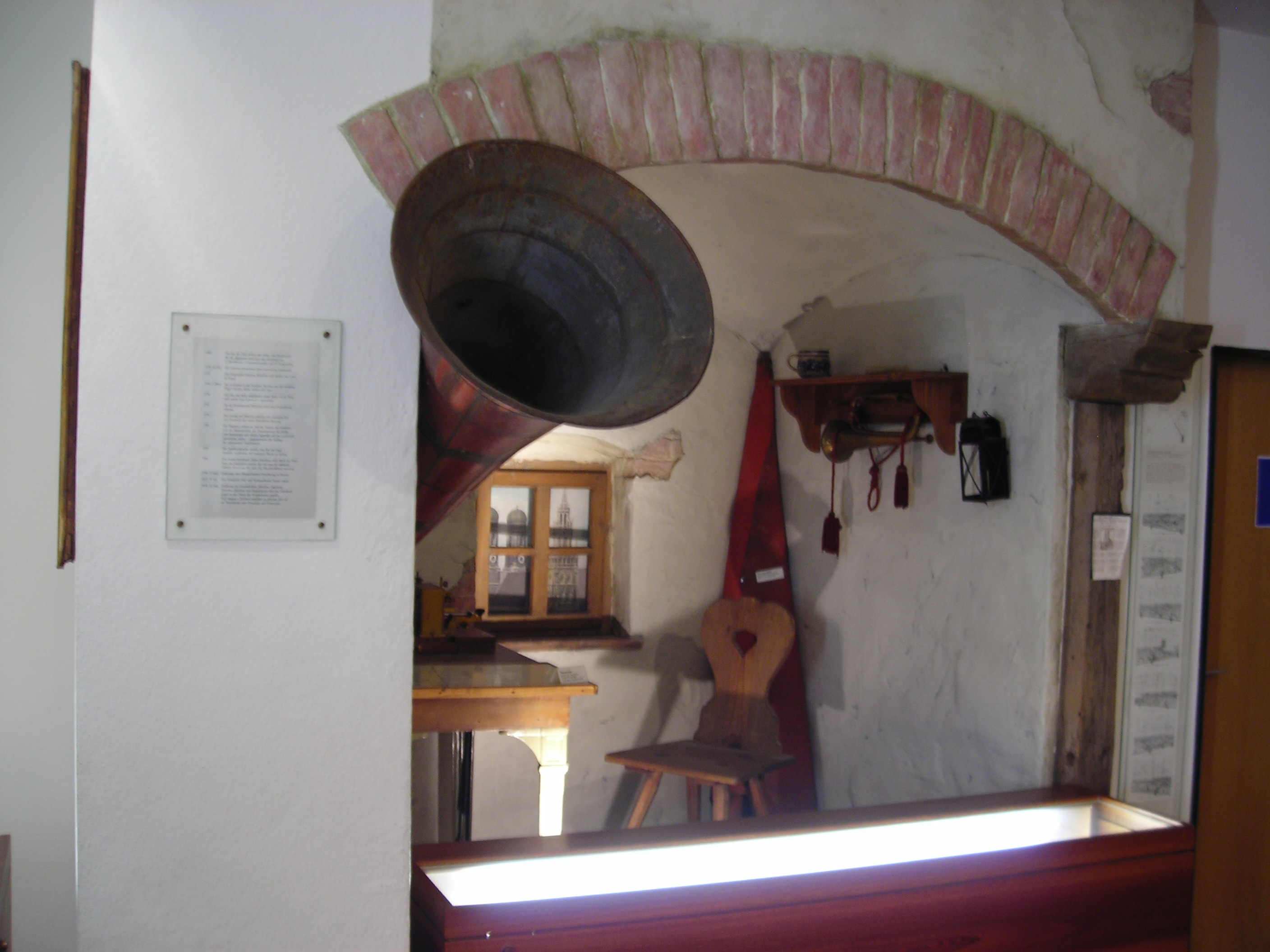 Turmwache im Kirchturm von St. Peter in München wie es sie von 1756 bis zum Anfang des 20. Jahrhunderts (?) gab (es wurde nicht angegeben, welcher Zeit das Turmzimmer entspricht). Der Türmer hielt nach Bränden und Rauchentwicklungen in der Stadt Ausschau und nahm die Alarmierung der Feuerwehren bzw. der Bevölkerung vor. Nachbau im Feuerwehrmuseum München